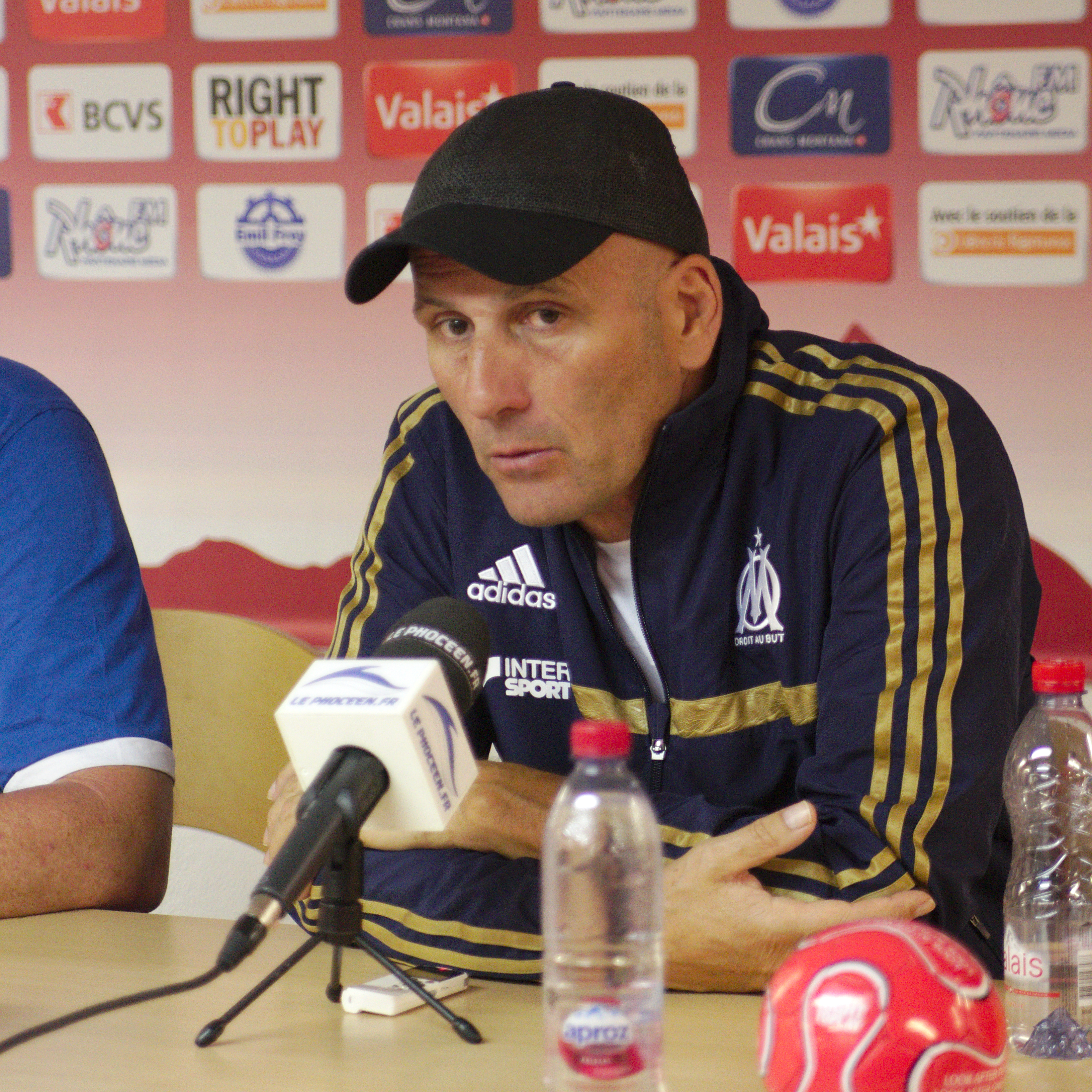 Valais Cup 2013 - OM-FC Porto - 20130713 - Elie Baup à la conférence de presse